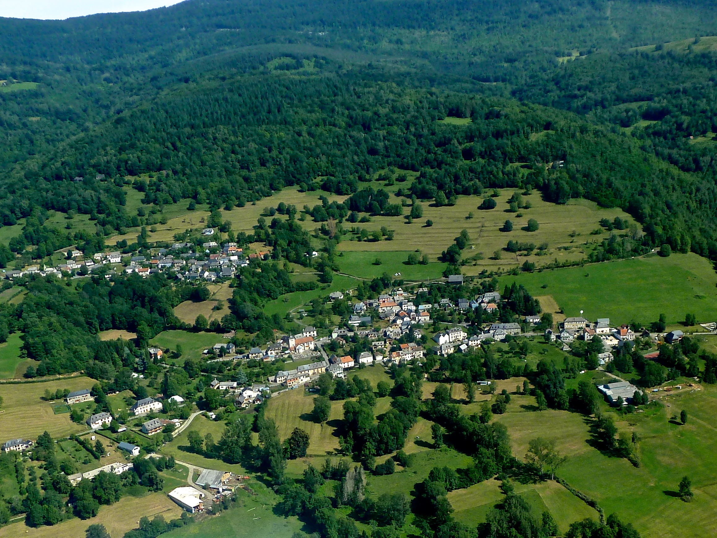 Orgibet (centre bas) et Saint Jean du Castillonais (haut gauche) vus du ciel.